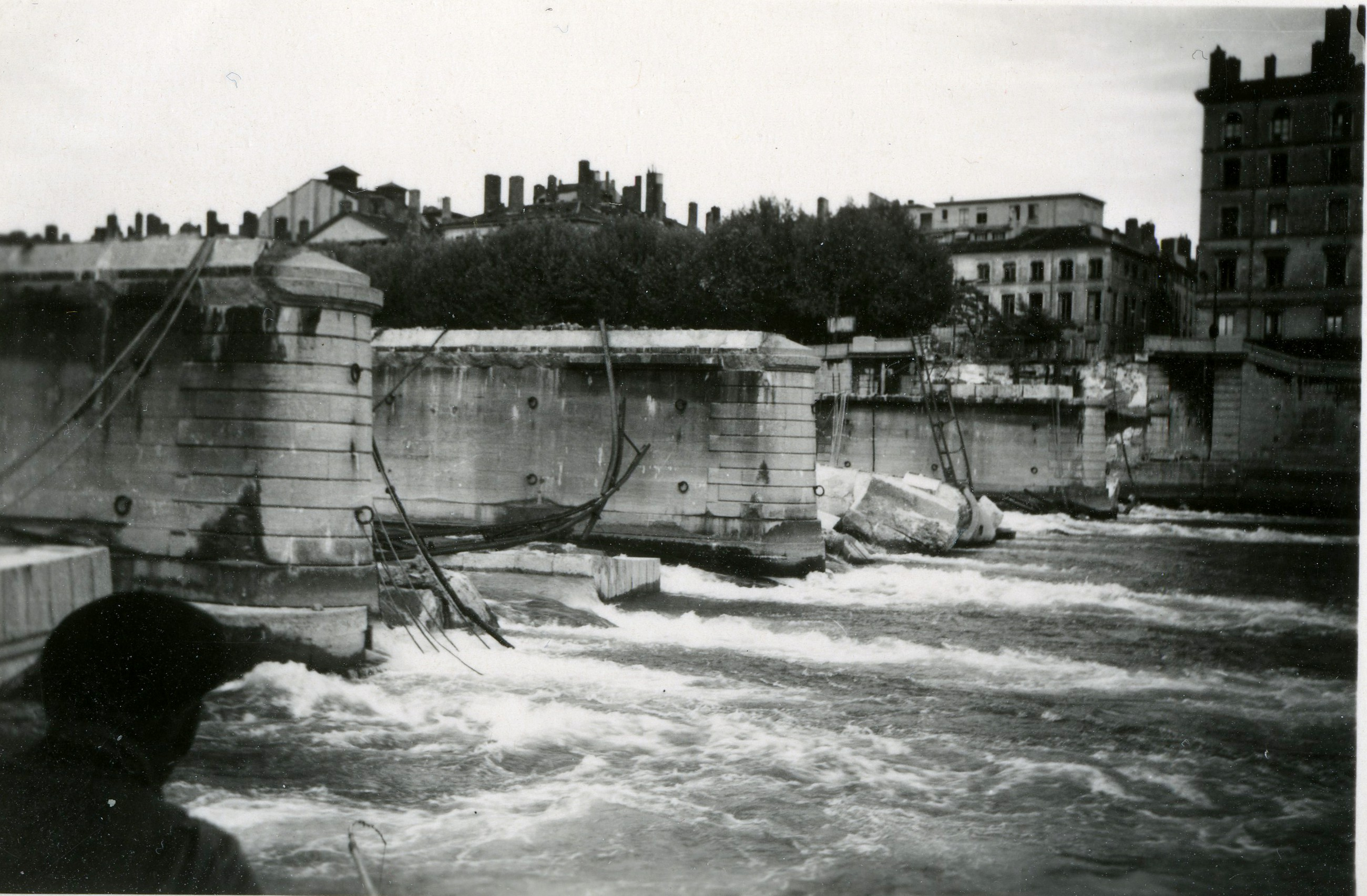 Lyon, pont Tilsitt sur la Saône, détruit par les Allemands en 1944 - remplacé par l'actuel pont Bonaparte